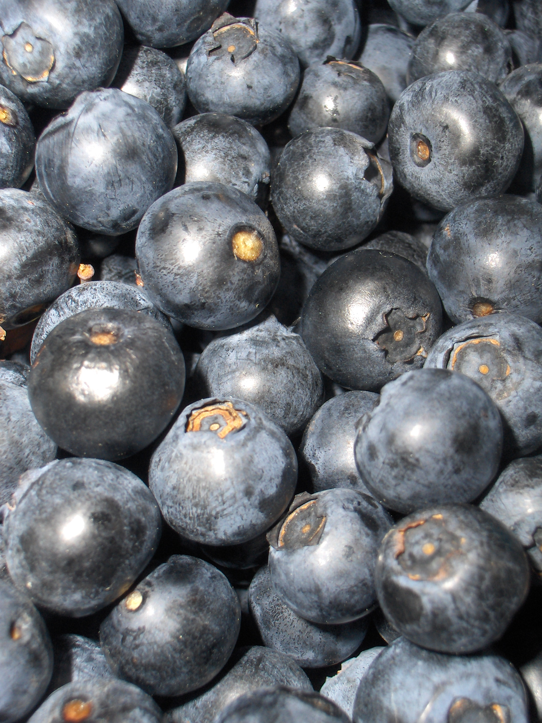 Billberry, big zoom.